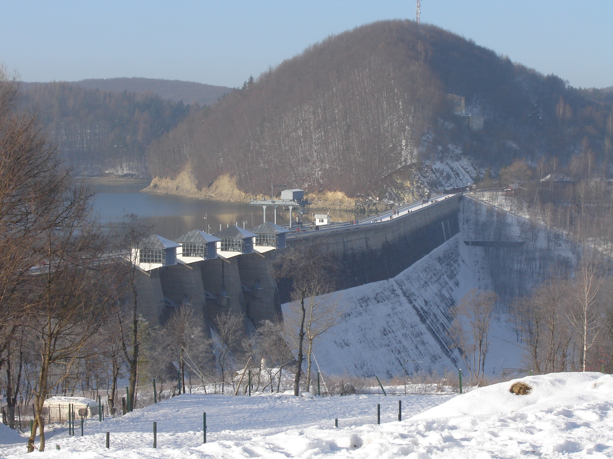 Zapora solińska w zimie